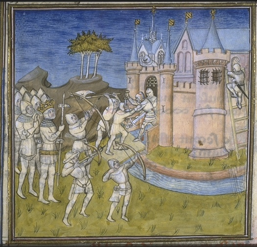 Siège d'un château (conflit opposant Henri Ier à son frère Robert, soutenu par sa mère la reine Constance)